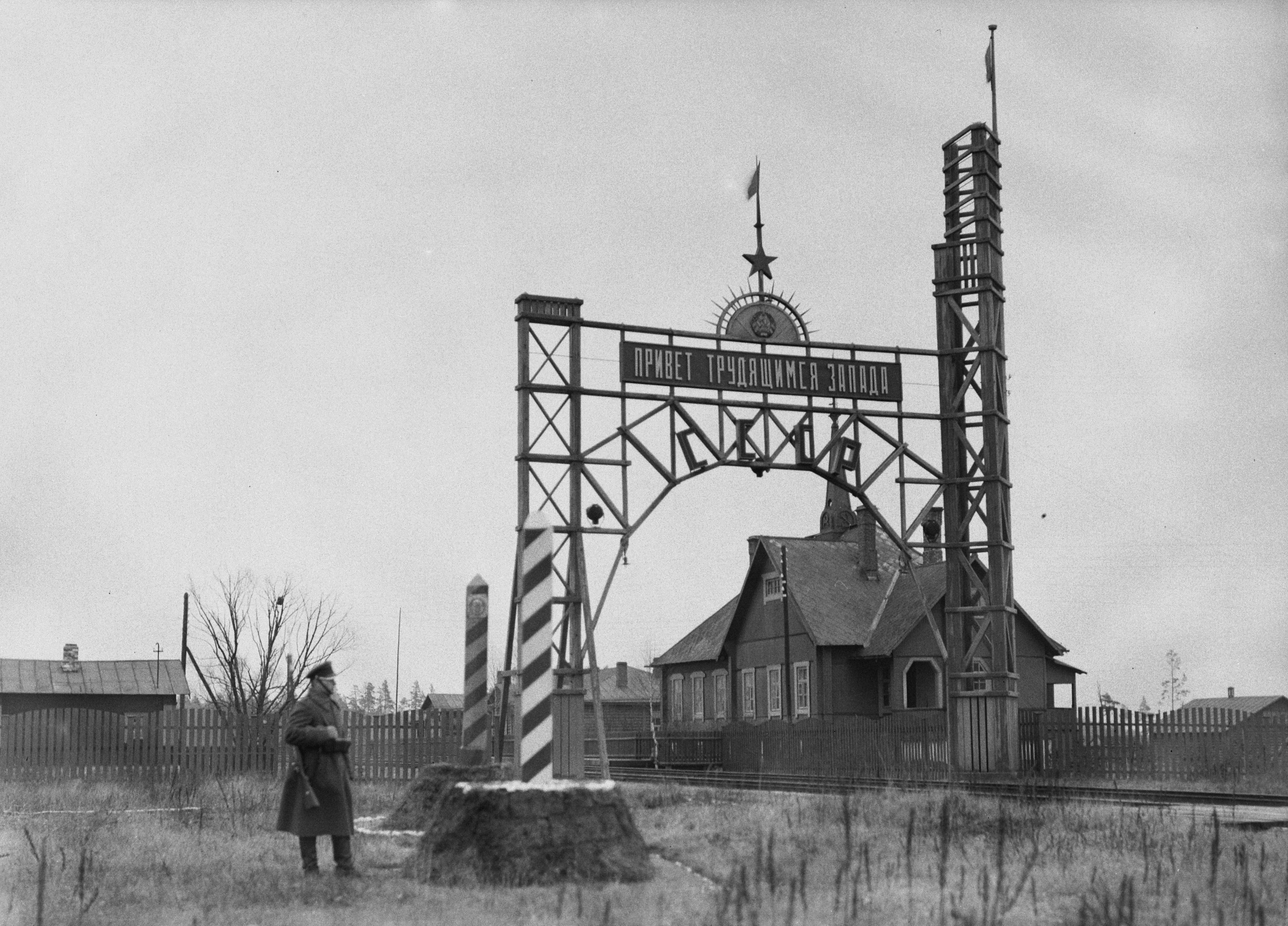 Collectie / Archief : Fotocollectie Van de Poll Reportage / Serie : Reis naar Polen Beschrijving : Russische en Poolse grenspalen bij Stoubcy Annotatie : Stoubcy in Wit-Rusland is het voormalige Stolpce in Polen. Datum : 1934 Locatie : Wit-Rusland Trefwoorden : grensovergangen, militairen Fotograaf : Poll, Willem van de Auteursrechthebbende : Nationaal Archief Materiaalsoort : Negatief (zwart/wit) Nummer archiefinventaris : bekijk toegang 2.24.14.02 Bestanddeelnummer : 190-1153